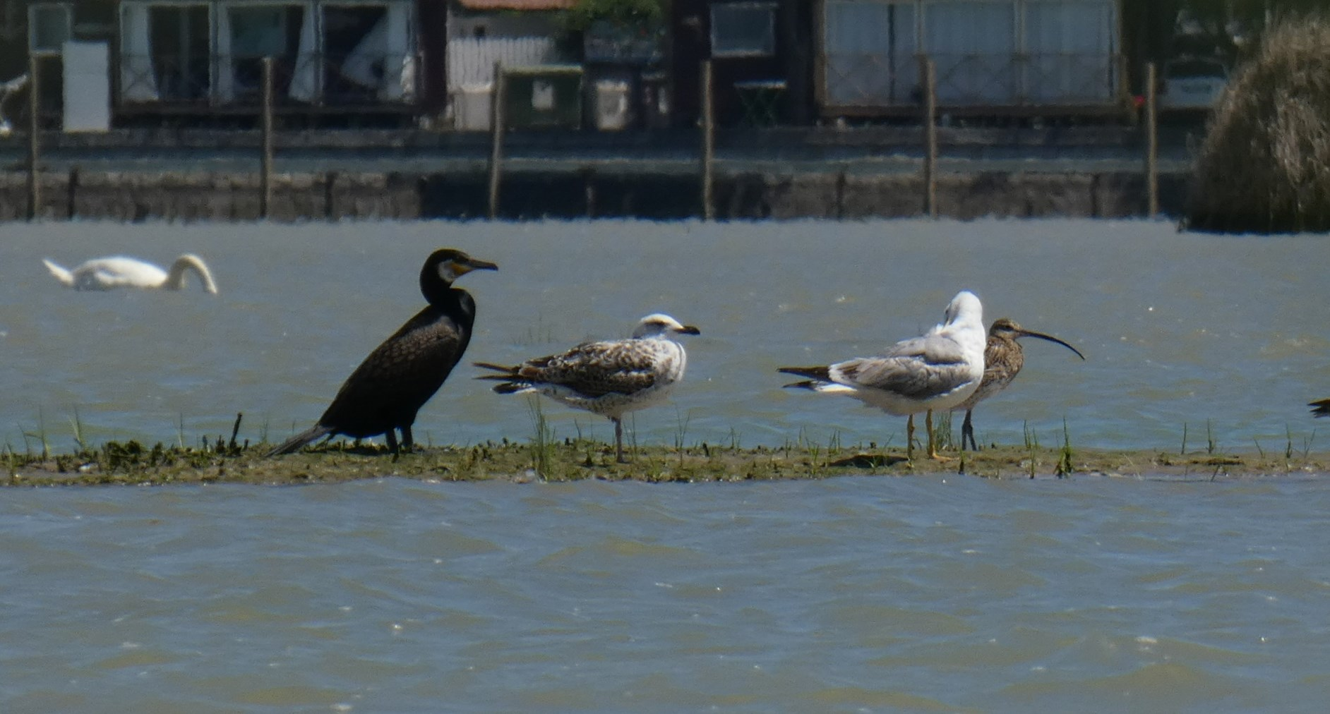 Valle Vecchia - Zumelle - Valli di Bibione (Q55719875)